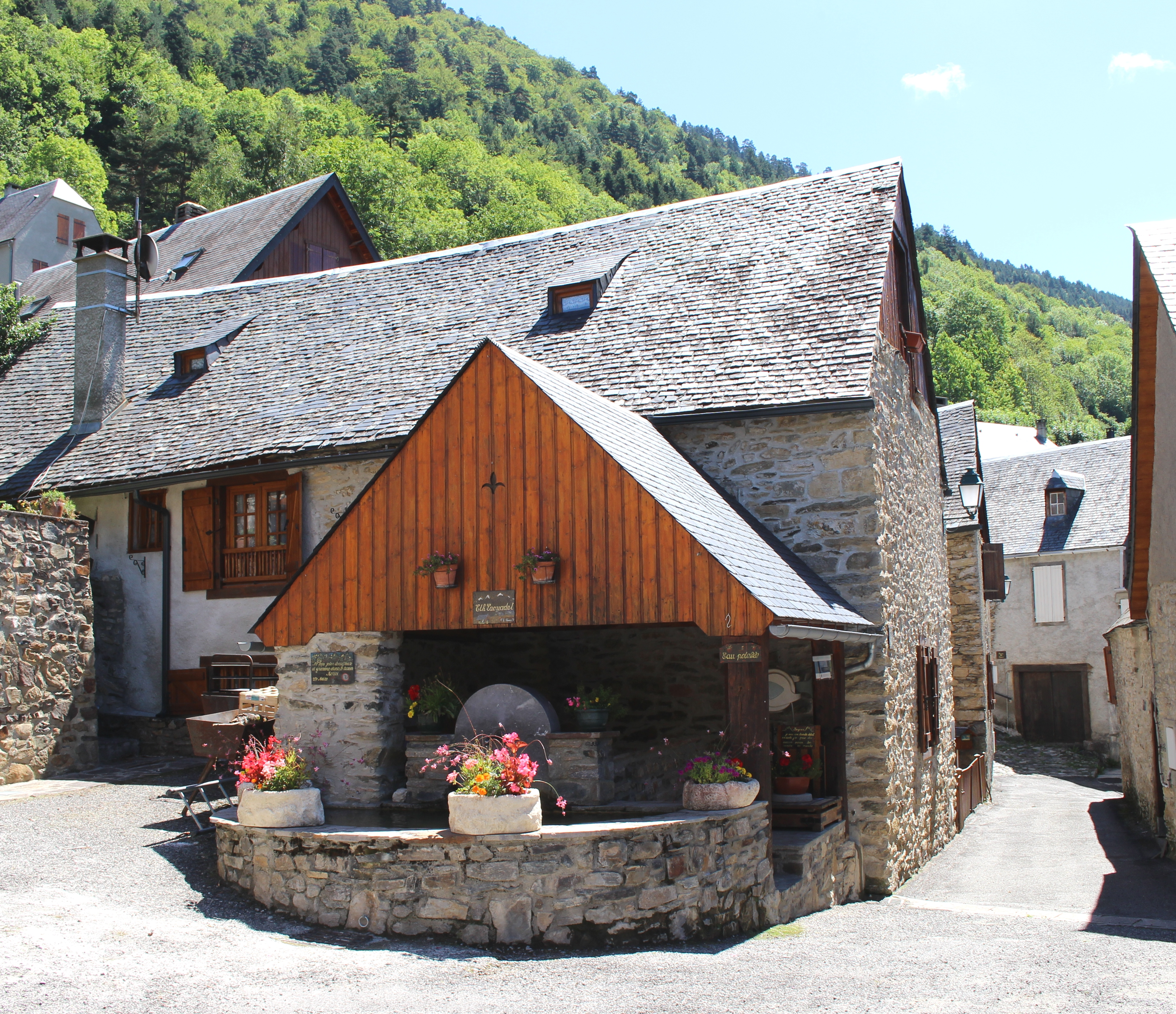 Lavoir de Grailhen (Hautes-Pyrénées)